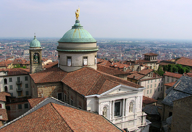 Duomo - Bergamo